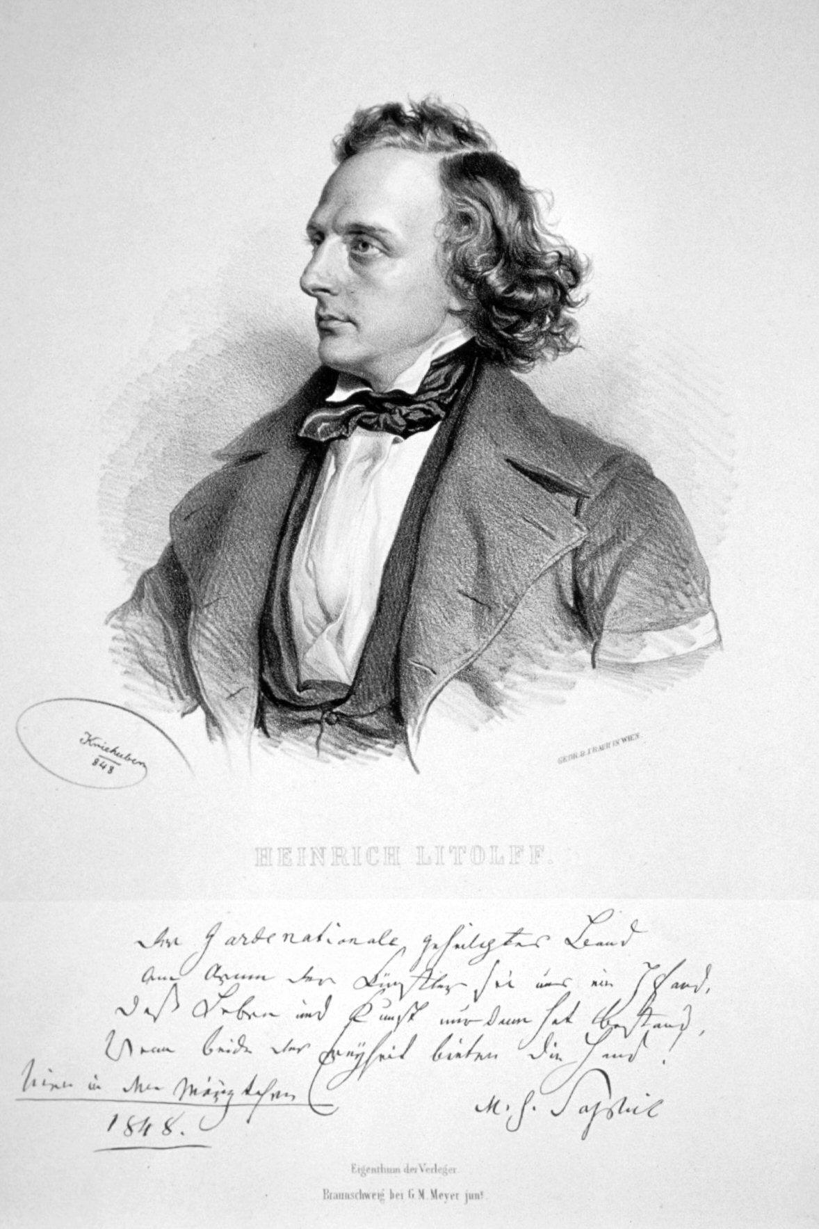 Heinrich Litolff, Lithographie von Josef Kriehuber, 1843